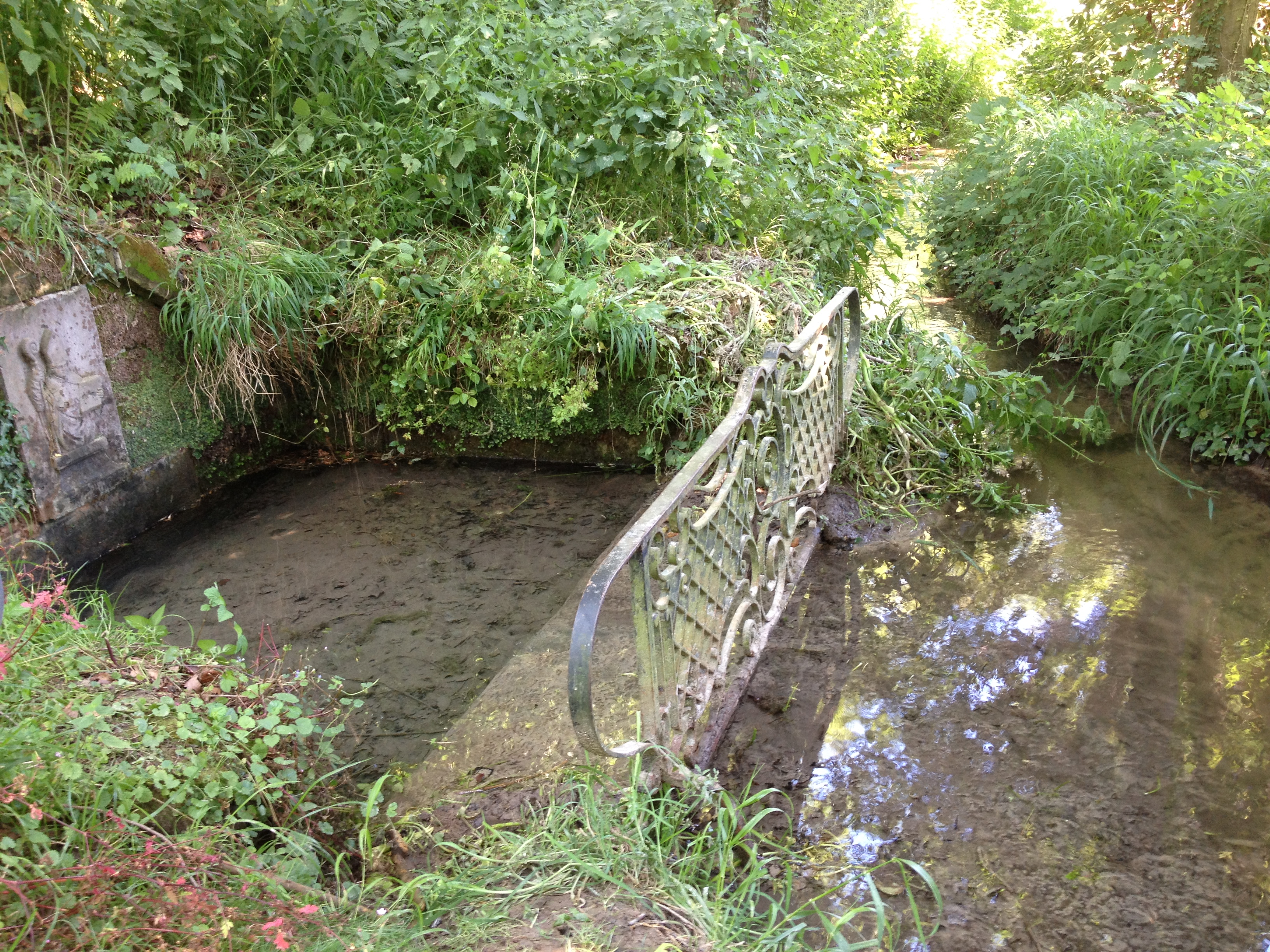 Lambertusbron in Altenbroek, Voeren, België.